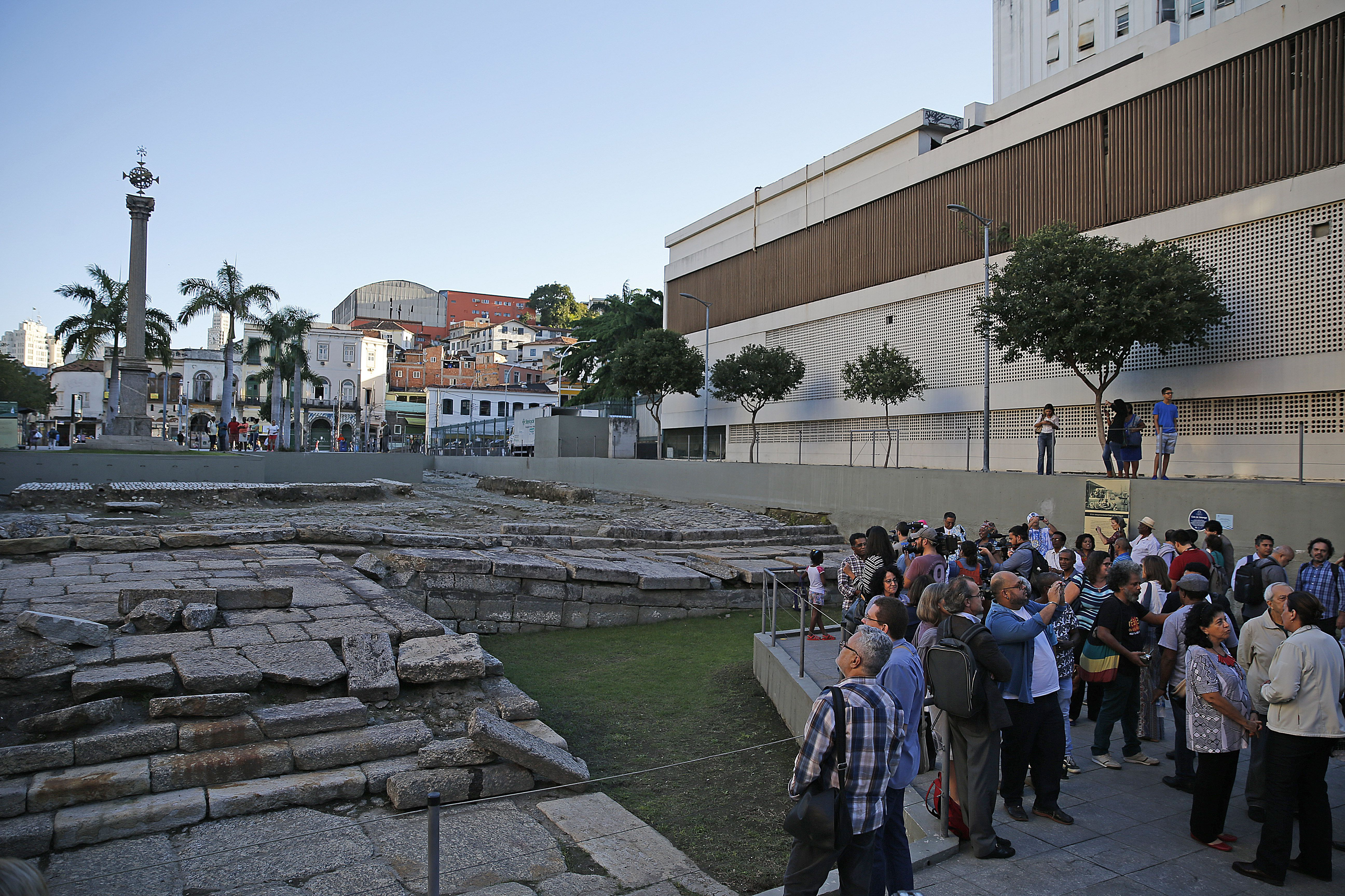 Rio de Janeiro - O Cais do Valongo, principal porto de entrada de escravos nas Américas é reconhecido como Patrimônio da Humanidade pela Unesco (Fernando Frazão/Agência Brasil).